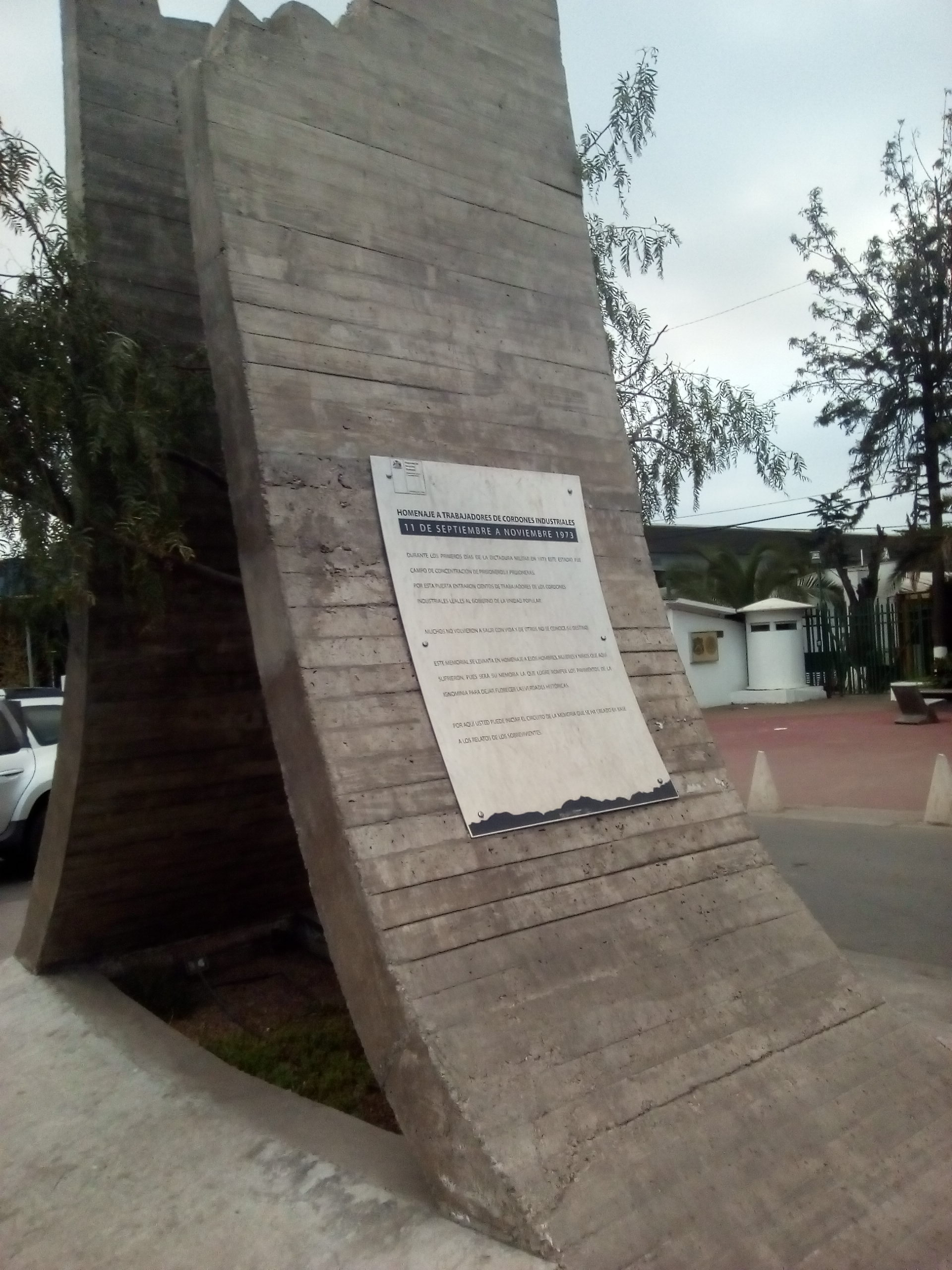 Monumento en la Entrada del Estadio Nacional en conmemoración a obreros detenidos y algunos desaparecidos por las fuerzas de represión del régimen de Pinochet